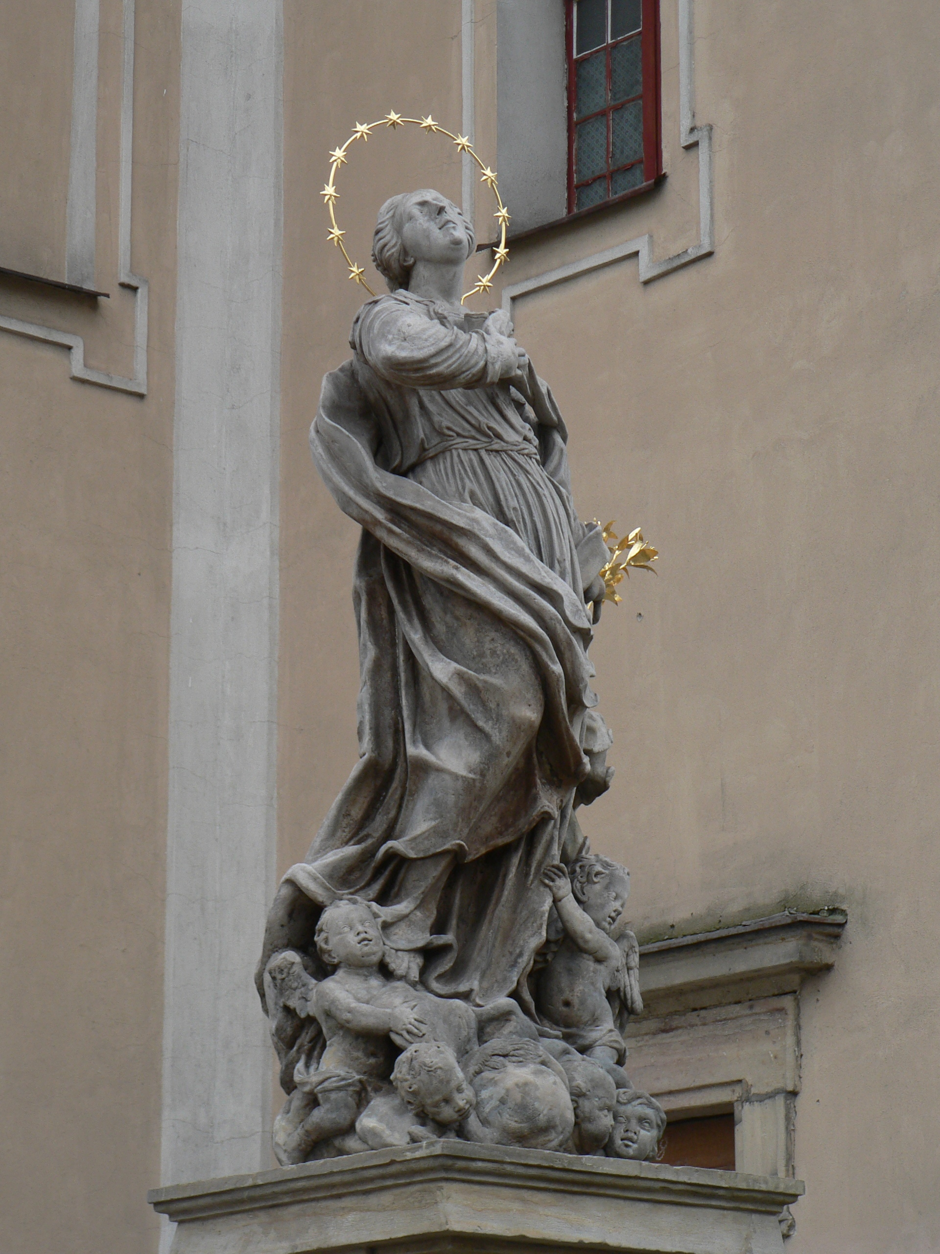 Libina, socha Panny Marie před kostelem (polovina 18. století)